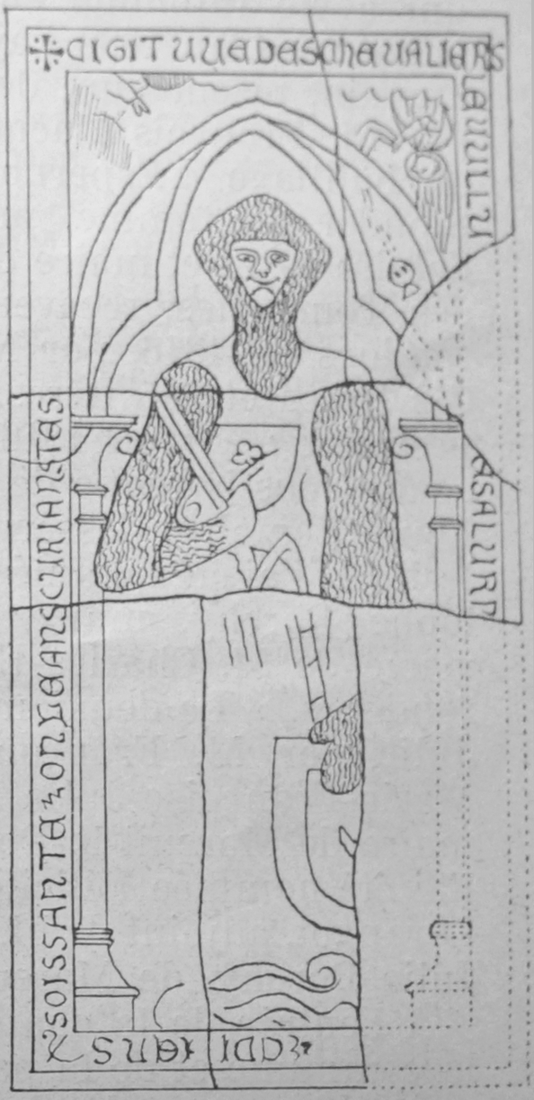 issue de l'almanach de 1910.